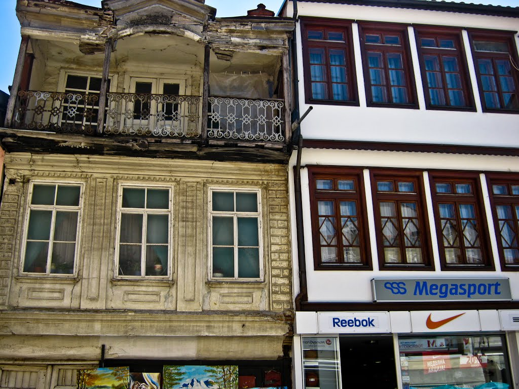 Satrogradska arhitektura vo Struga